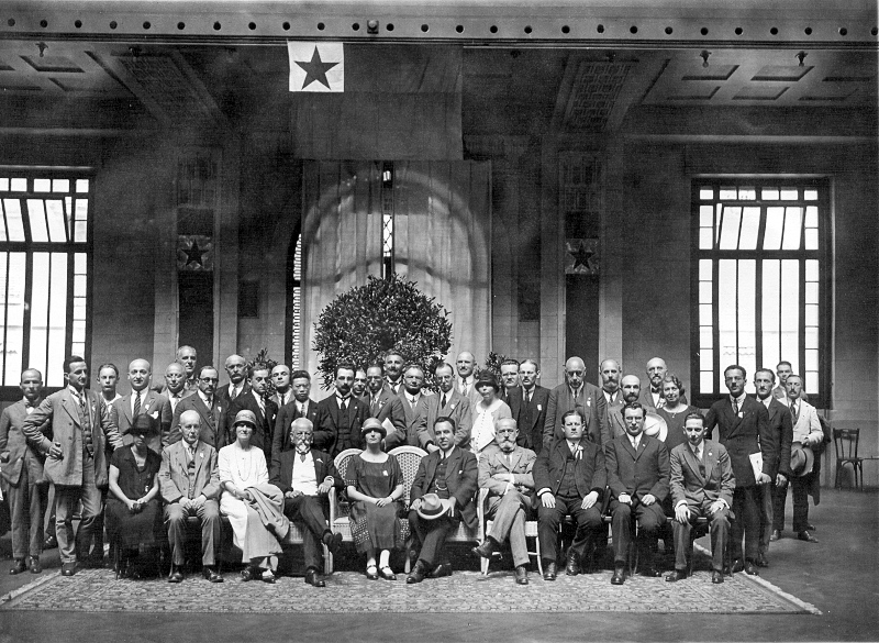 17. Esperanto-Weltkongress, Genf 1925. Gruppenfoto wichtiger Teilnehmer. Sitzend, v.l.n.r.: ?, ?, ?, Hippolyte Sebert, Julia Isbrücker, Edmond Privat, Johannes Dietterle, Robert Kreuz, Hans Jakob, ?. Stehend, v.l.n.r.: ?, Bernhard Aeltermann, ?, ?, Heinrich Gustav Arnhold, Karl Frenckell, ?, ?, ?, ?, Pater Kaoh, Frans Schoofs, Andreo Cseh, ?, ?, ?, ?, ?, ?, Rudolf Hromada, ?, ?, ?, Paul Blaise, ?, Margaret Lilly Blaise, ?, ?, ?, ?